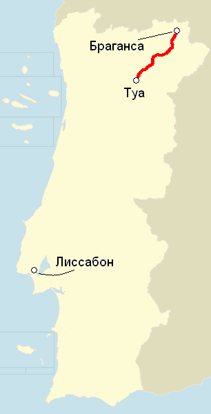 Mapa de localização do Linha do Tua em Portugal (inscrições na língua russa)